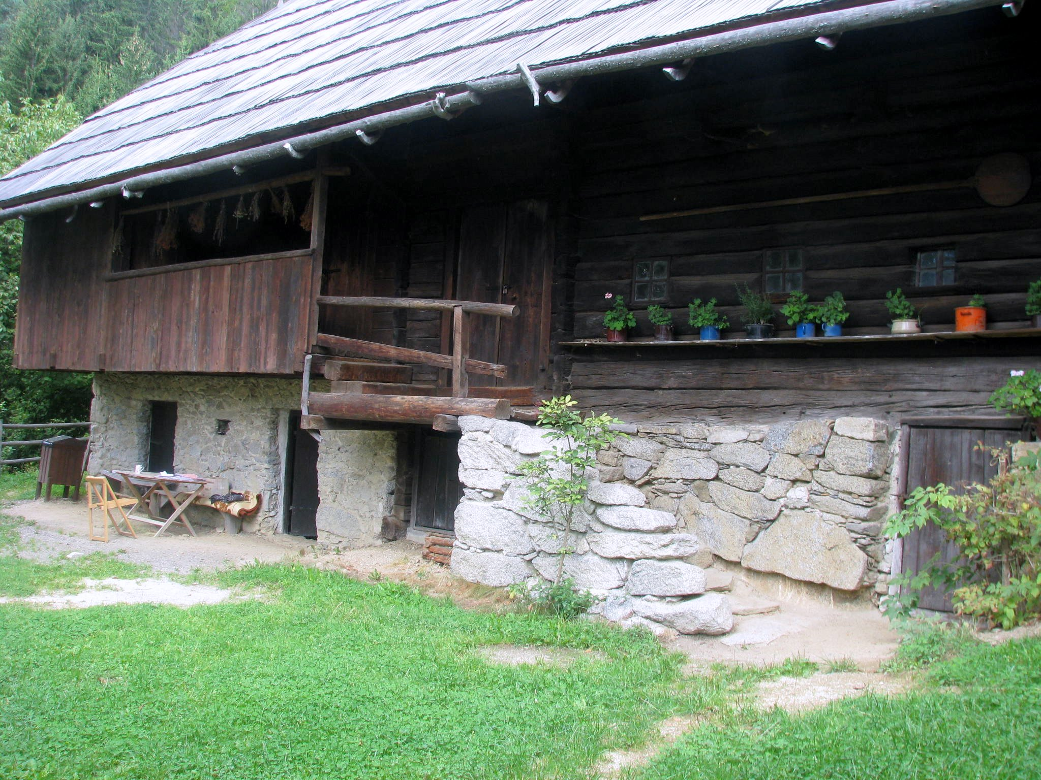 KAvčnikova domačija, Sevodnje, near Velenje, Slovenija